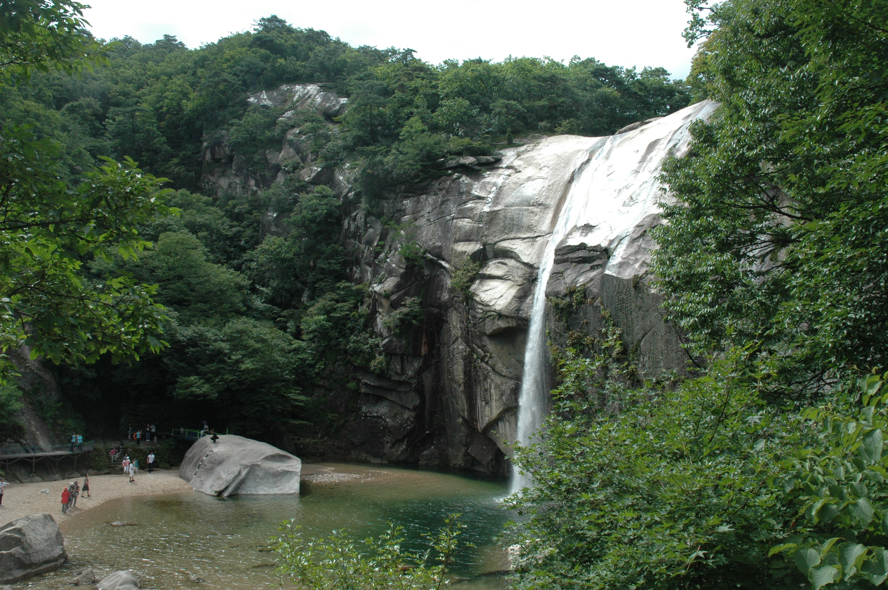 朴淵の滝